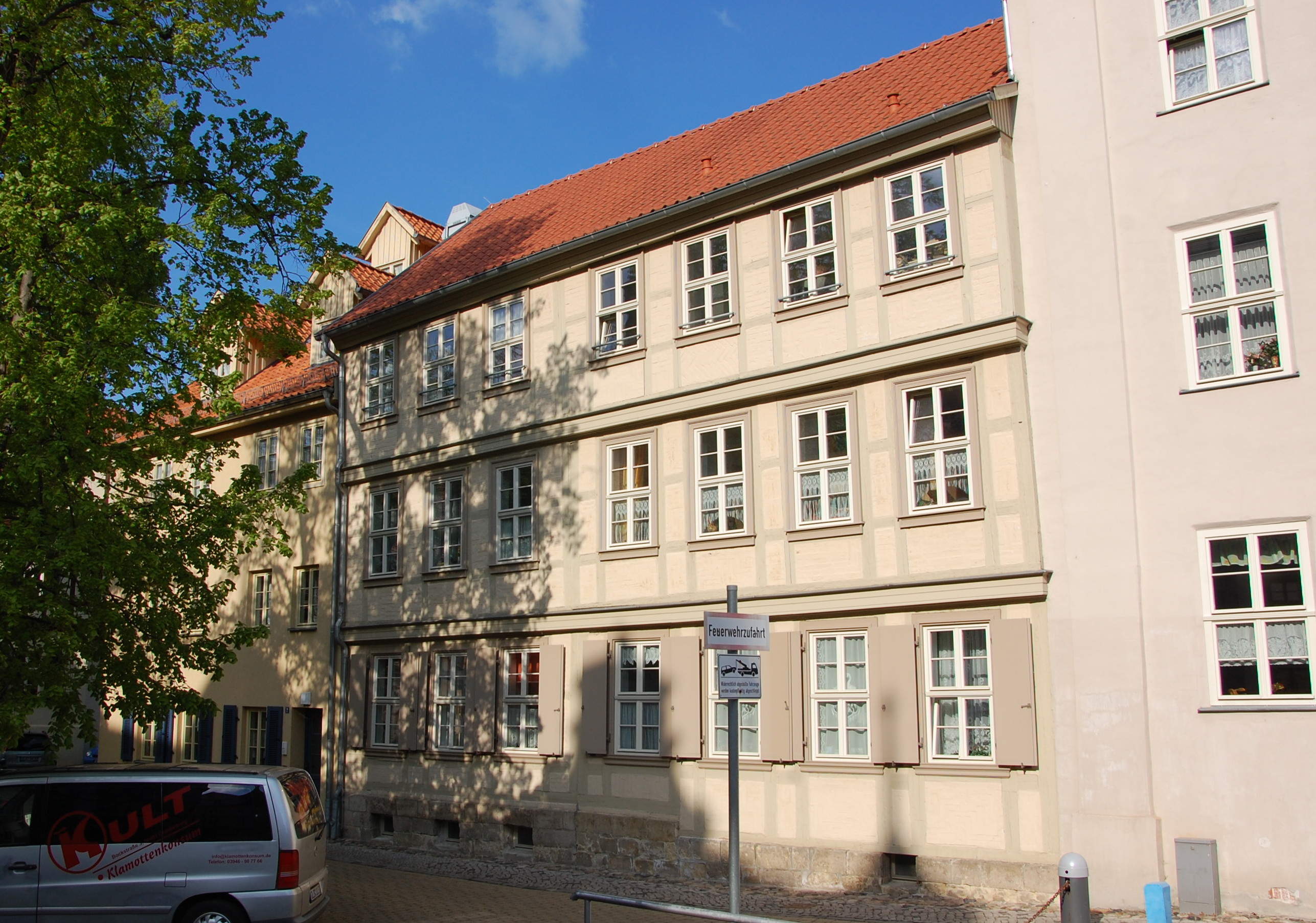 Haus Zwischen den Städten 2, 3 in Quedlinburg